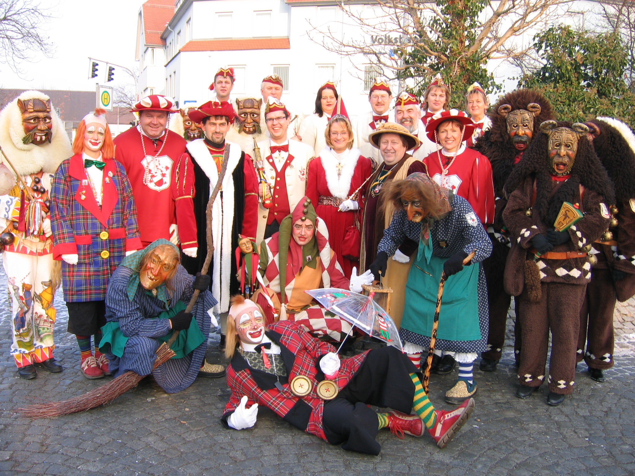 Narren der Narrenzunft Rottenburg am Neckar, 2006